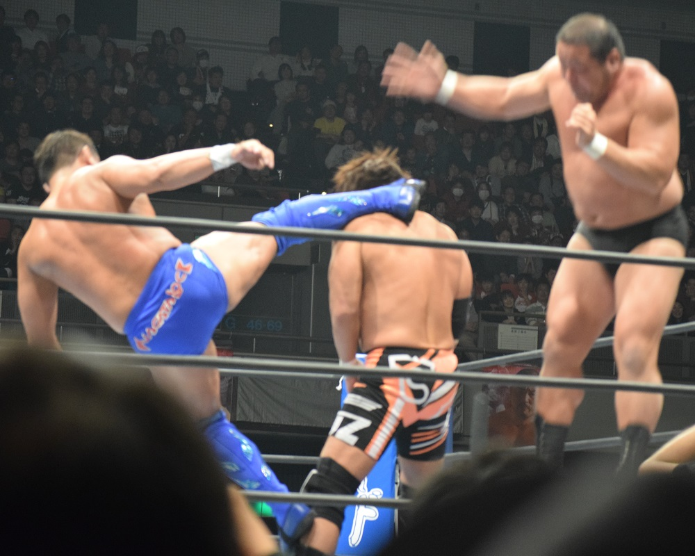 2016年2月11日 大阪府立体育会館 「THE NEW BEGINNING in OSAKA」 小島聡（中）にイーストゴールドを決める永田裕志（左）と中西学（右）